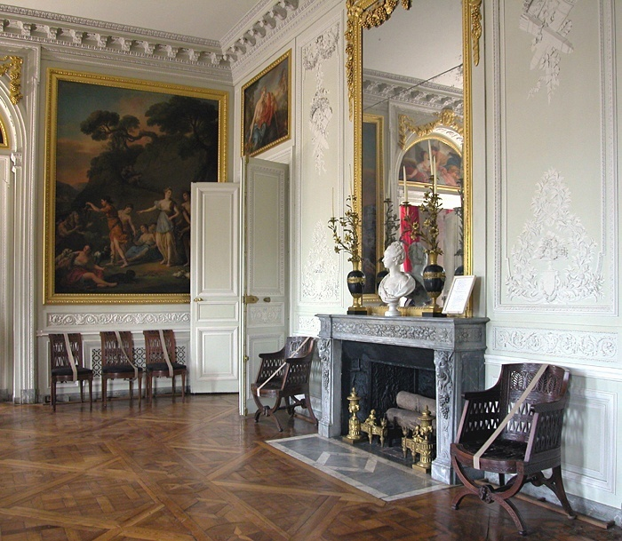 Cheminée avec chenets; Louis-Simon Boizot (Français, 1743-1809): Buste de Marie-Antoinette, vers 1775; Joseph Marie Vien (Français, 1716-1809): La Chasse, allégorie, approx. 1768-1772, huile sur toile; Georges Jacob (Français, 1739-1814): fauteuils curules et chaises, 1787, acajou. Grande salla à manger du Petit Trianon, Versailles, France.